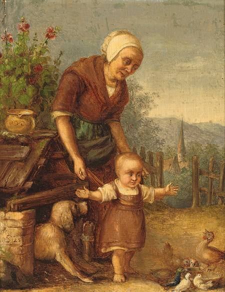 Mutter mit Kleinkind im Hühnerhof, Öl auf Holz, 26 x 21 cm